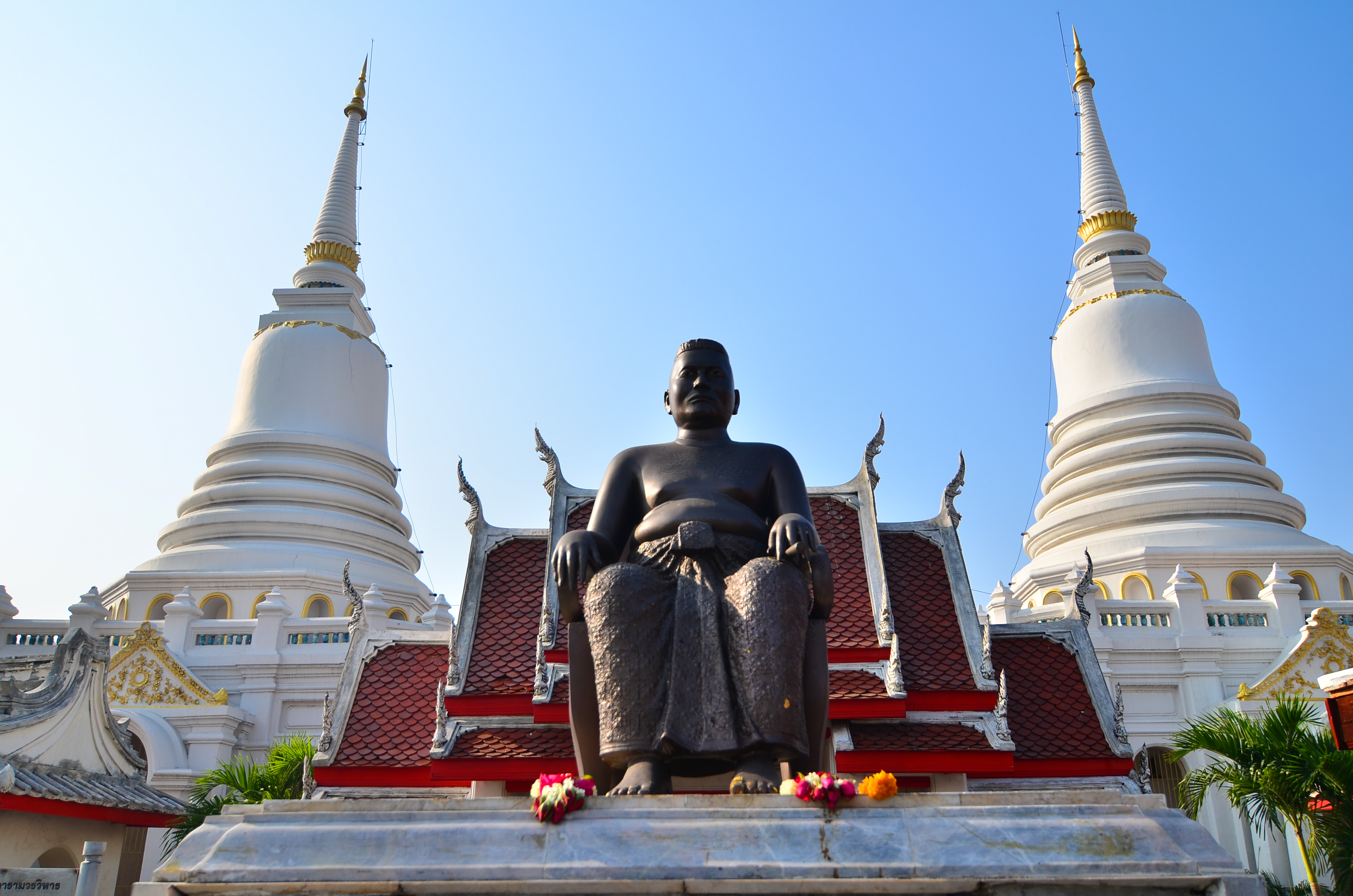 วัดพิชยญาติการาม